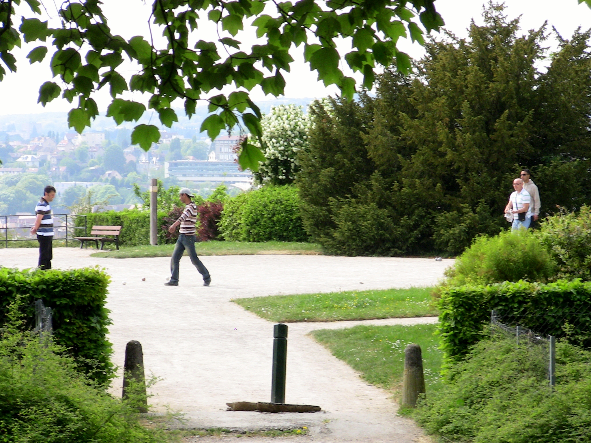 Bisontins jouant aux boules sur le square du fort de Beauregard, à Besançon (Doubs, France).